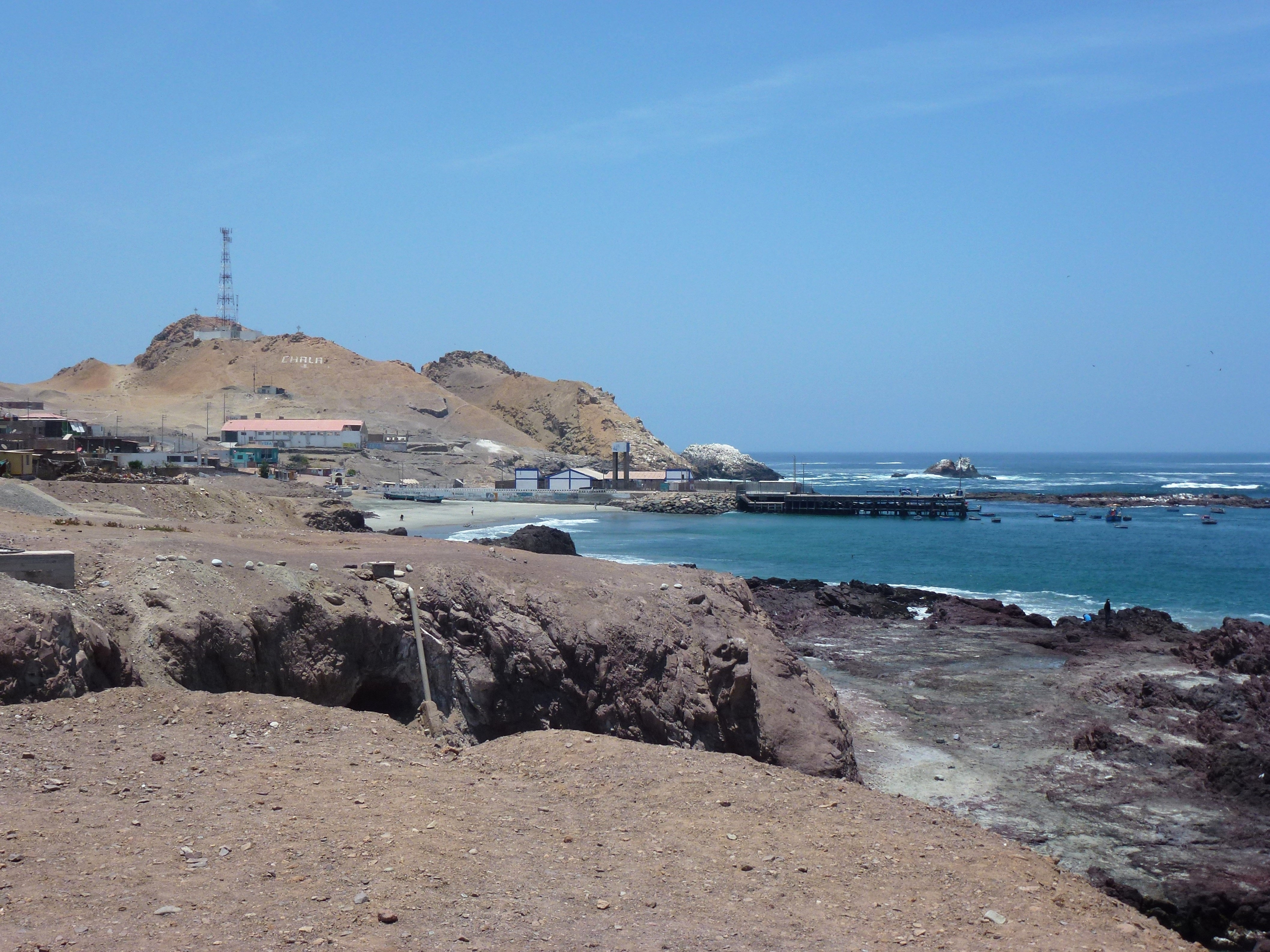 Playa de Chala District de Chala Provincie de Caravelí.-Perú.